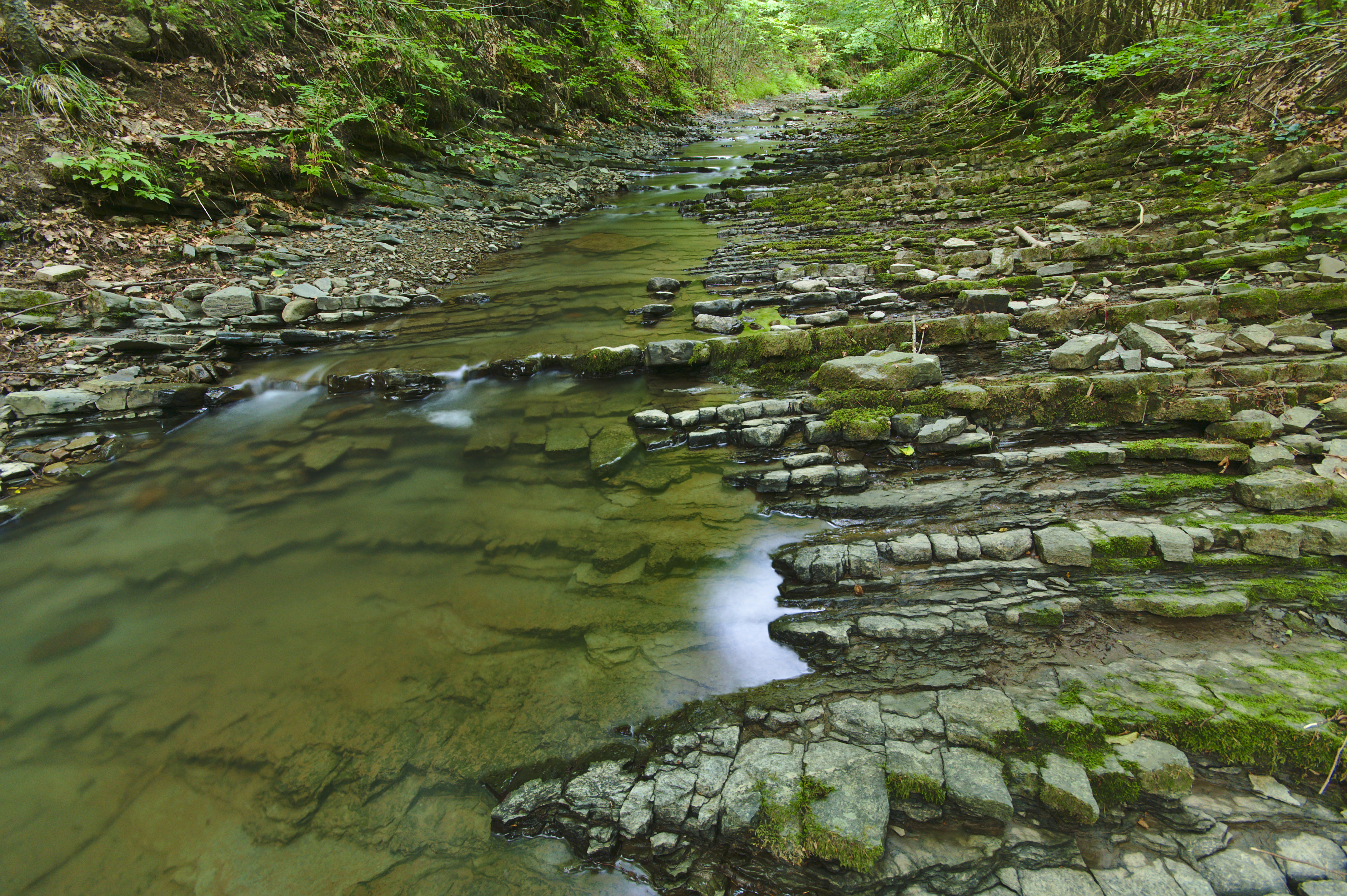 Ulička, Runina, okres Snina